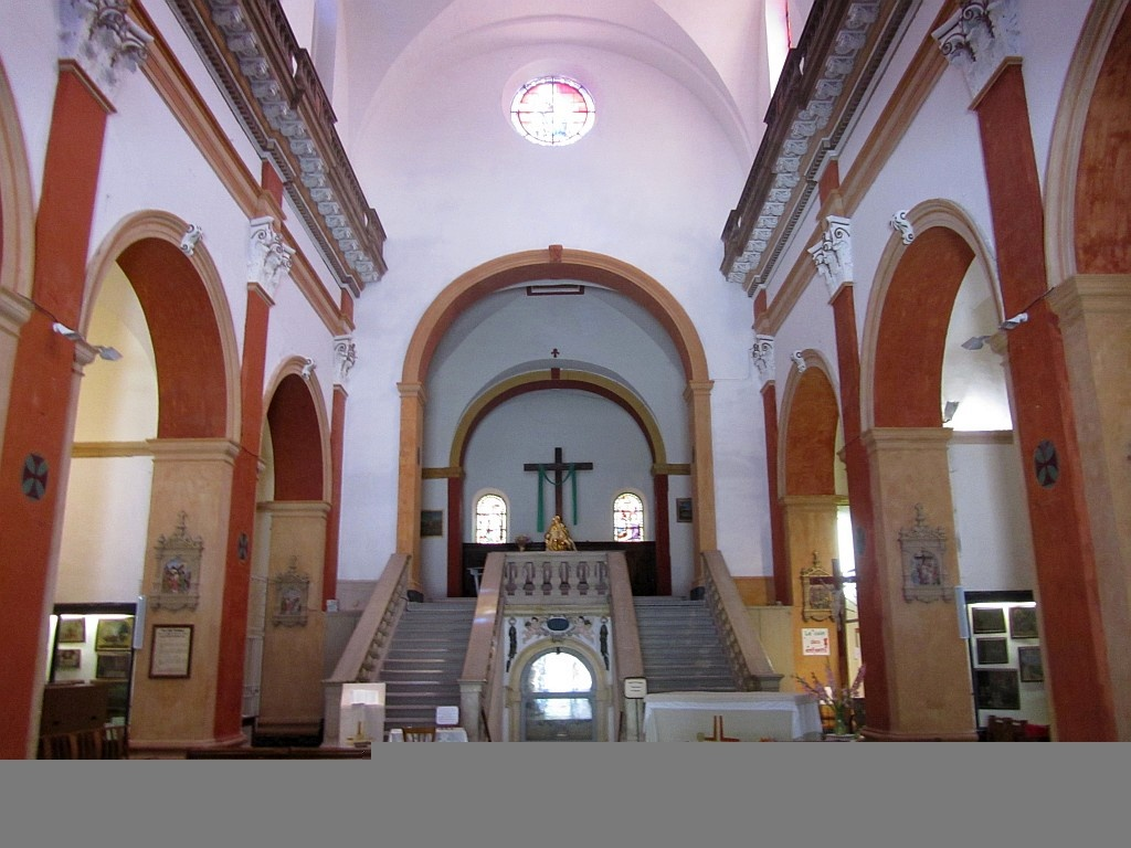 Chapelle réalisée par Georges Curtelin, située dans le Goult